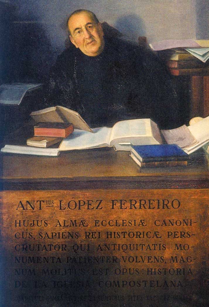 Antonio López Ferreiro (1837-1910)